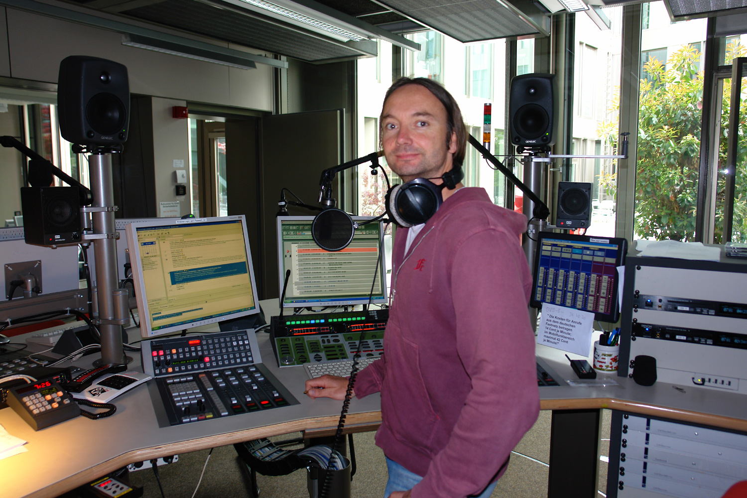 Radio Bremen in Bremen, Weserhaus. Ansgar Langhorst, „Bremen Eins“-Moderator im Studio